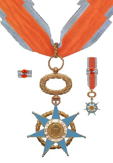 Eigen tekening Robert Prummel